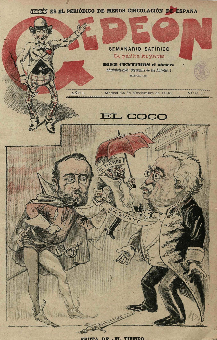 Portada del primer número de la revista satírica española Gedeón.